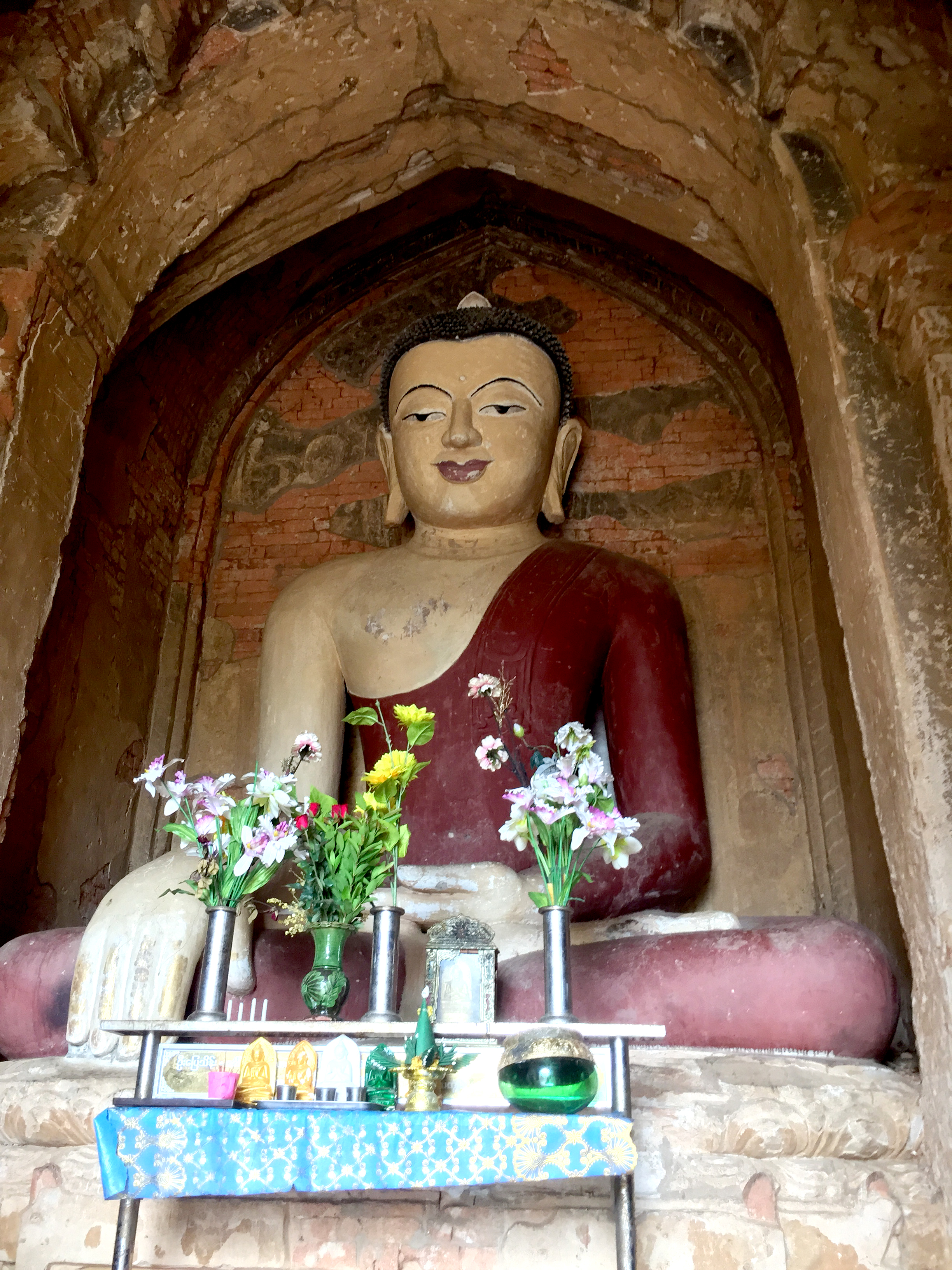 မြန်မာဘာသာ: စိမ်းညက်အစ်မ ဘုရား(ပုဂံ)